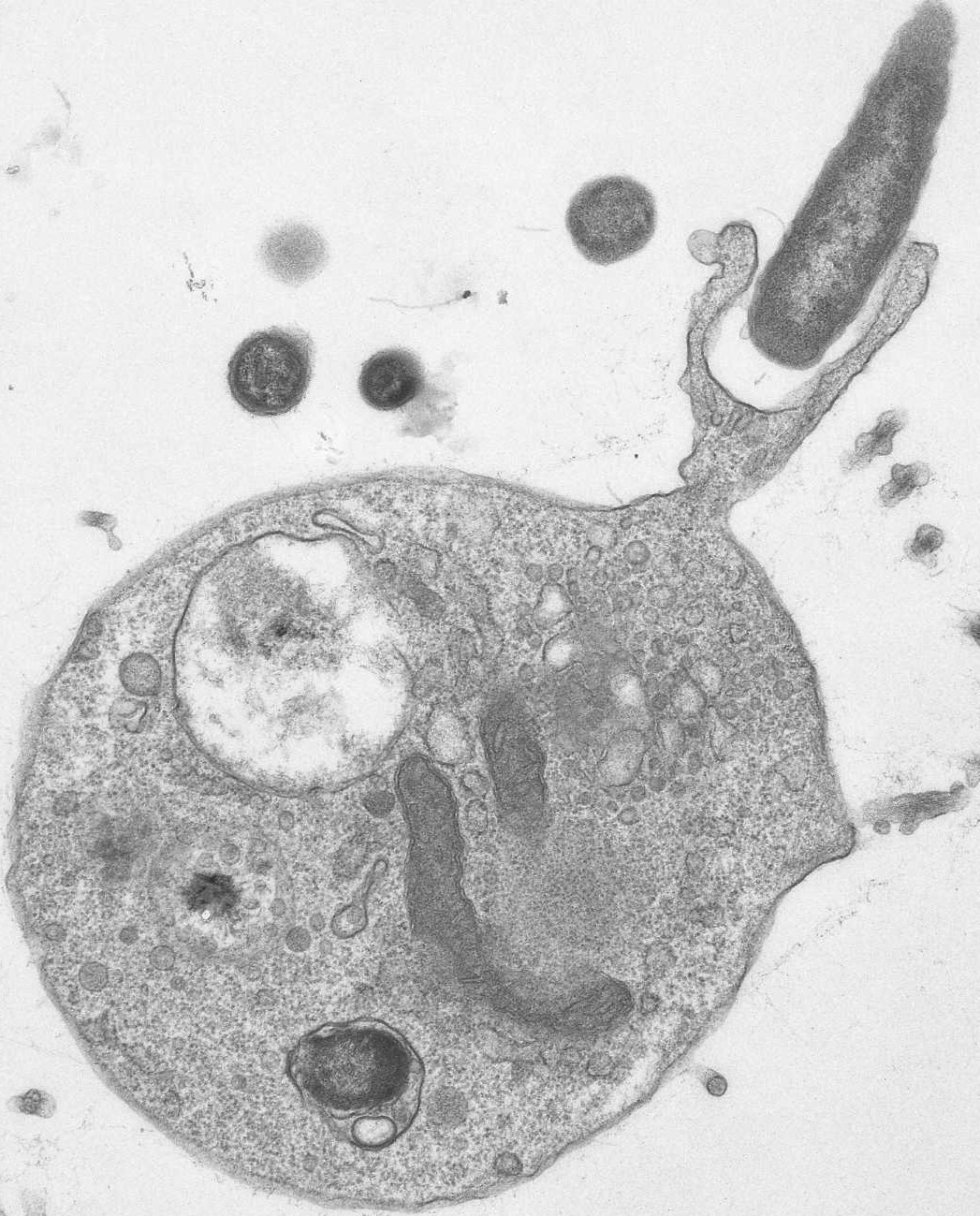 Monosiga ovata feeding (TEM)